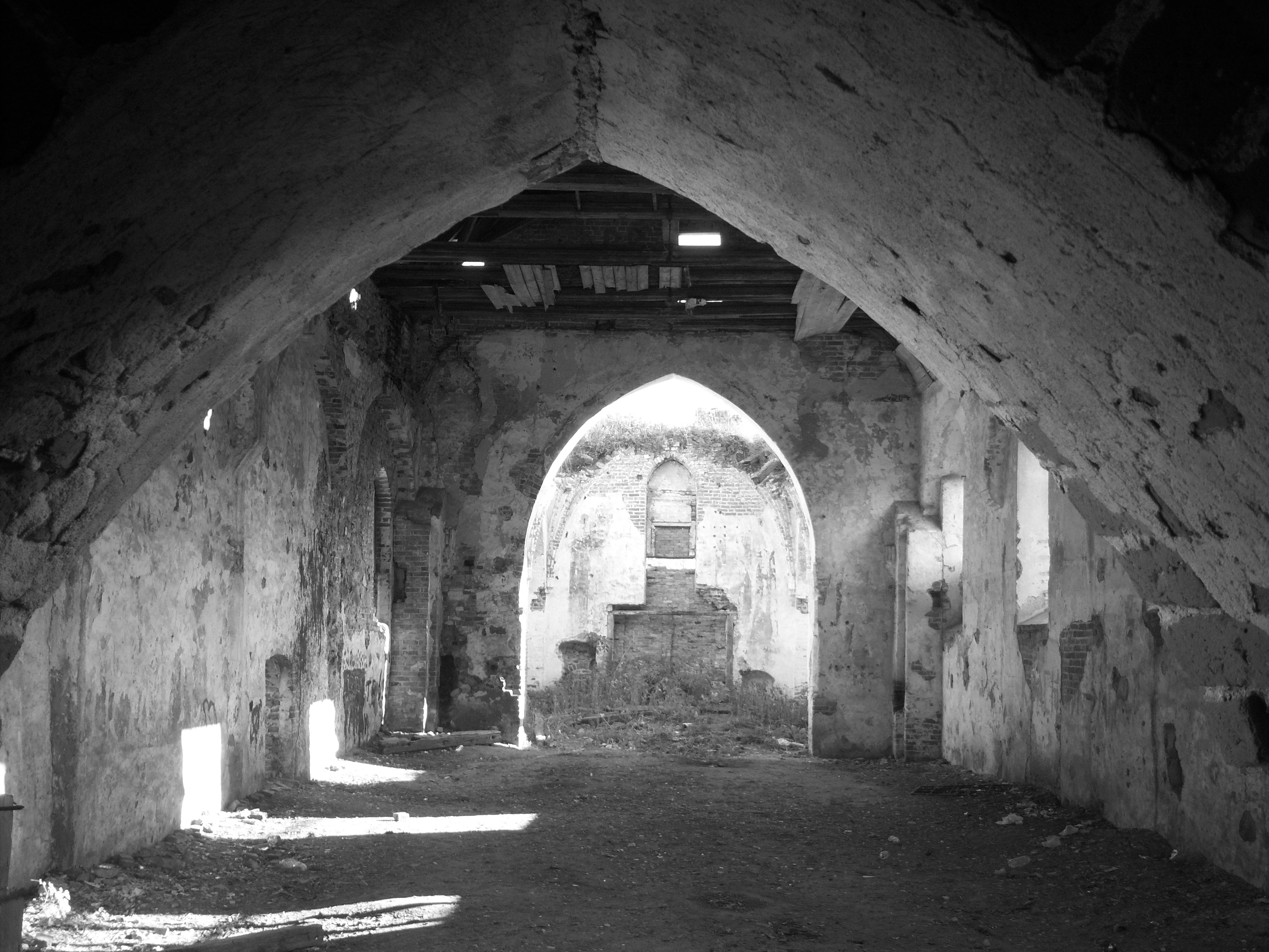 Под сводами кирхи в Кумачево...